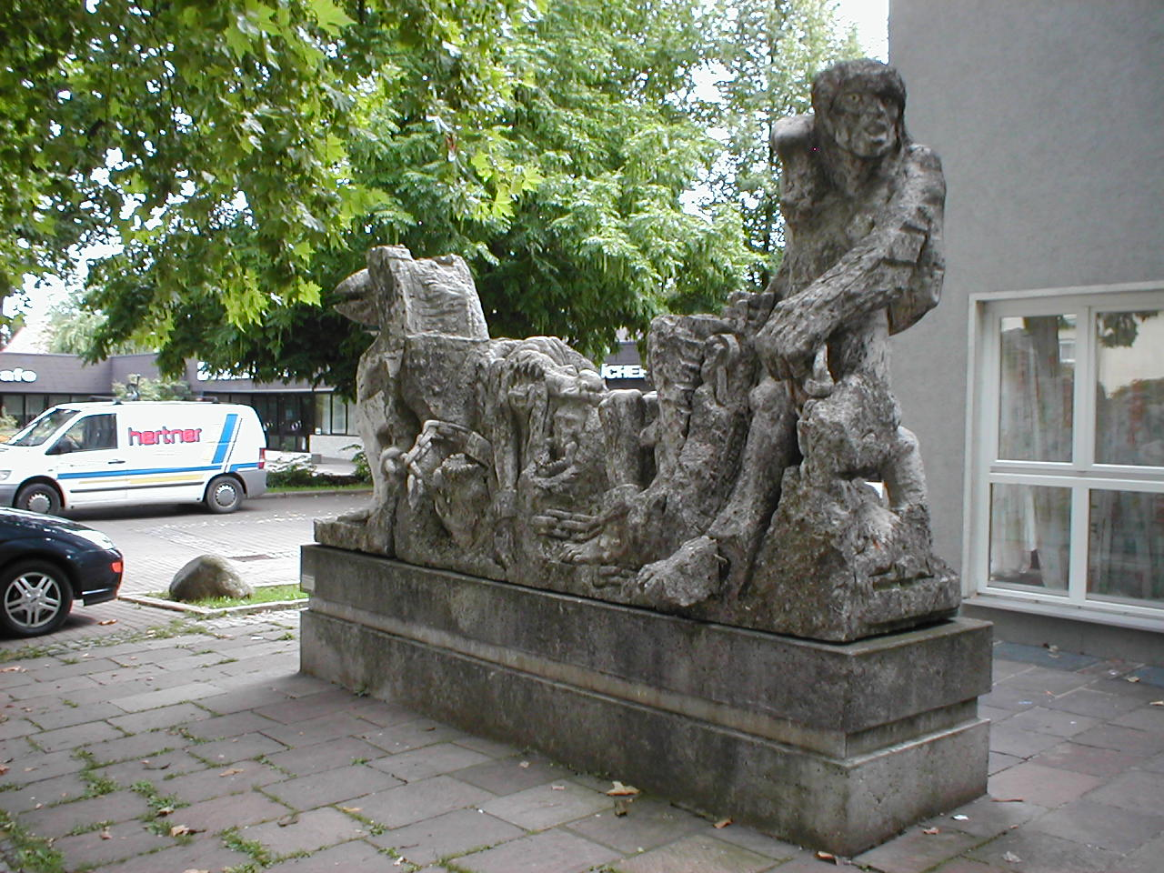 Die "Schwarze Hofmännin", eine Skulptur von Dieter E. Klumpp, hat seit ihrer Enthüllung 1986 mehrfach Kontroversen in Heilbronn-Böckingen ausgelöst.